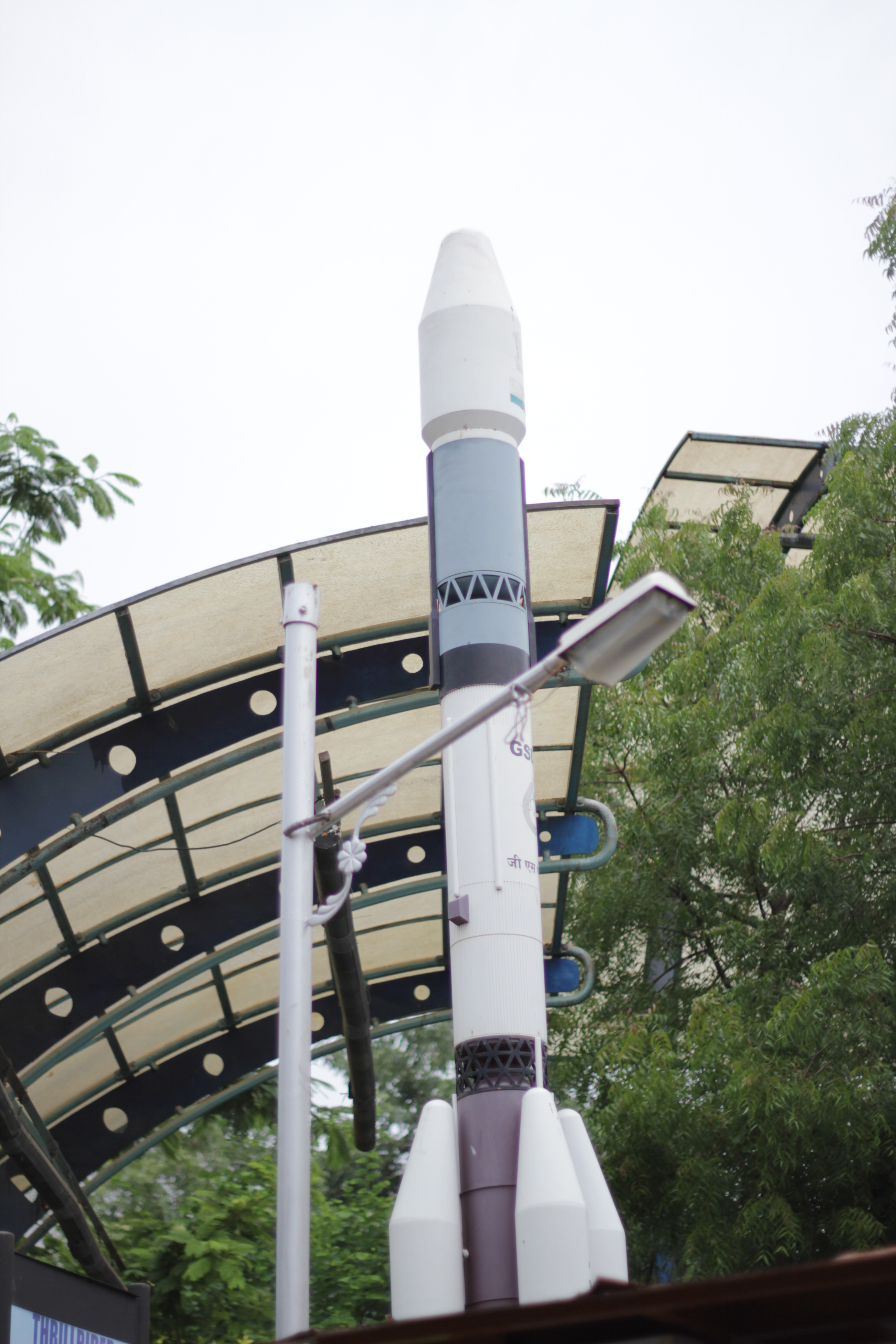 ગુજરાતી: સાયન્સ સિટીમાં રોકેટનું મોડેલ